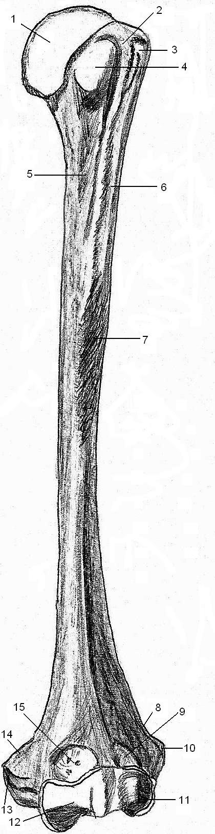 Humérus droit en vue antérieure